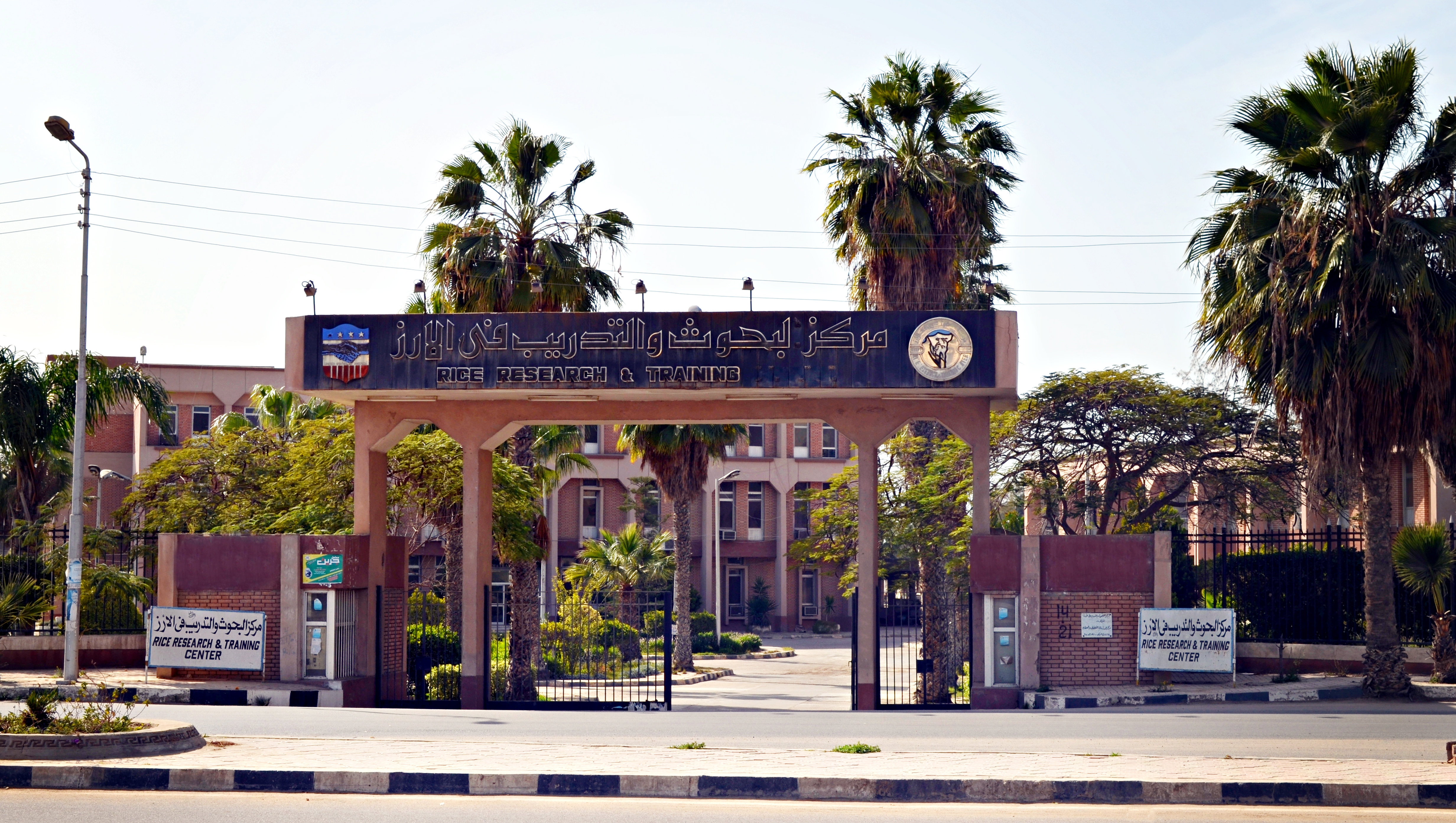 مركز البحوث والتدريب في الأرز